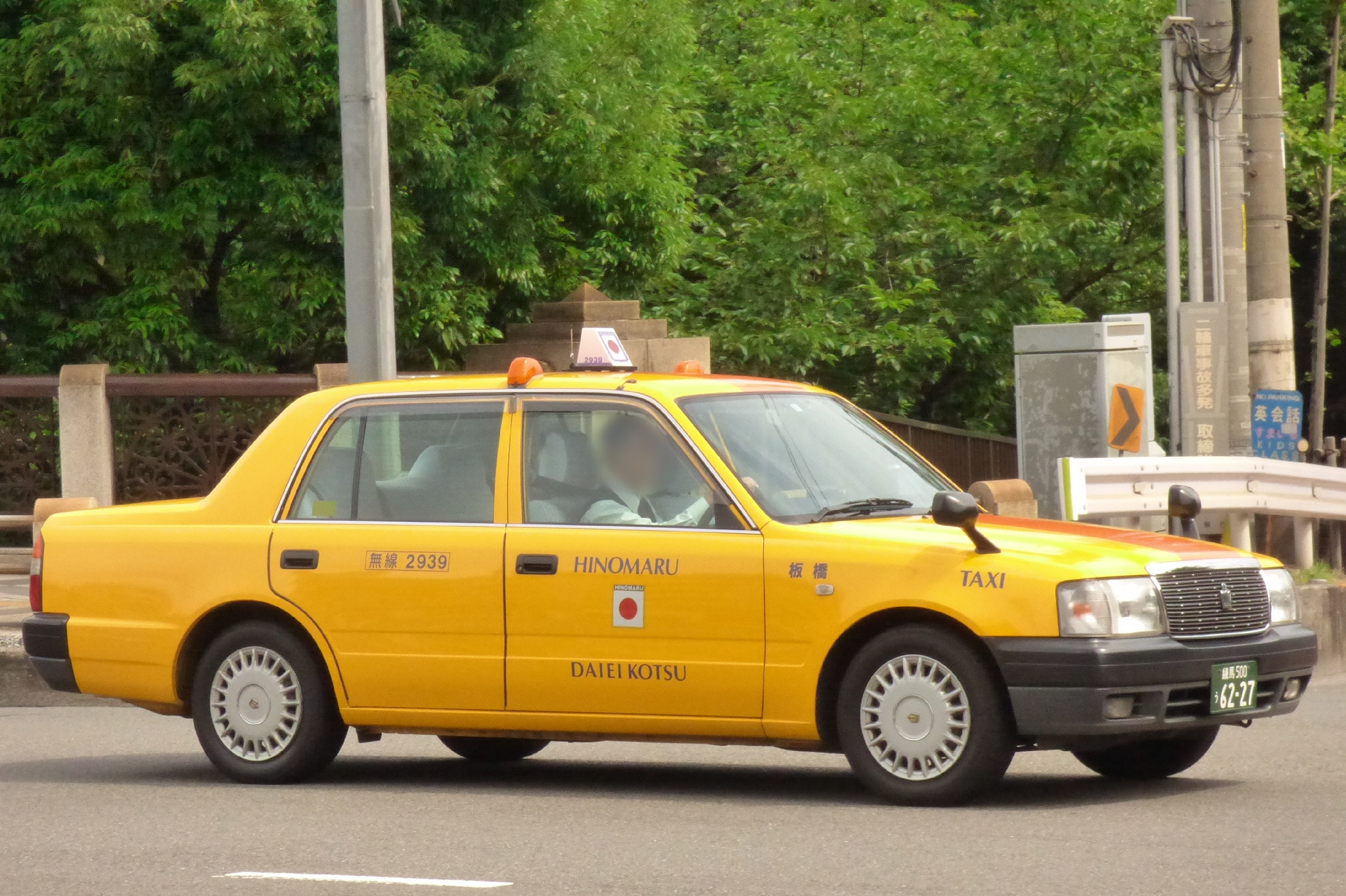 大栄交通のトヨタ・クラウンコンフォート